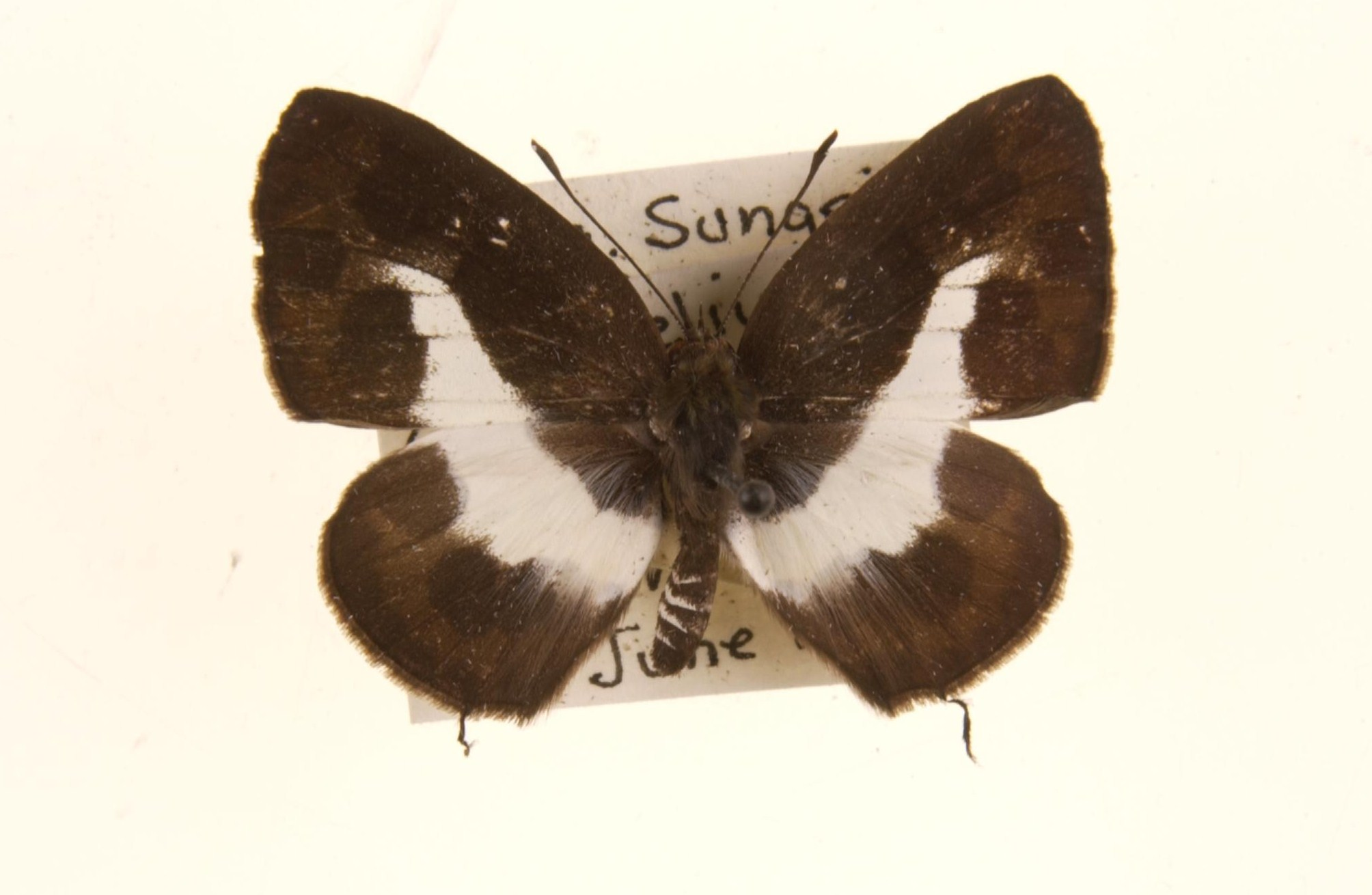 P.elna Malaya